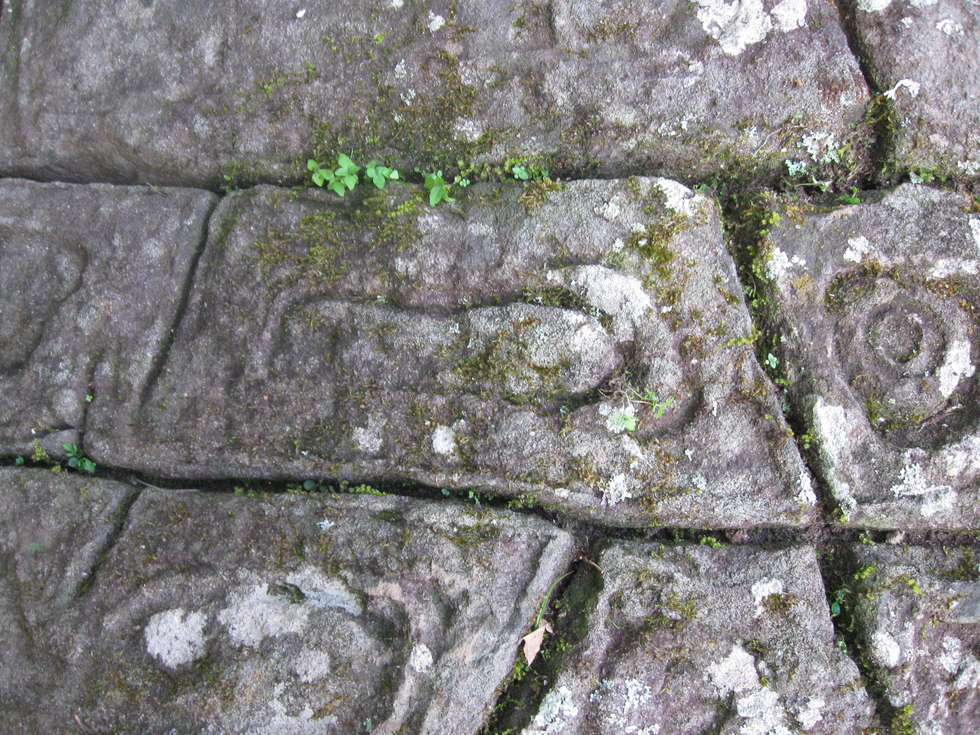 Detalle de piedra con jeroglificos en Berbeo Boyacá